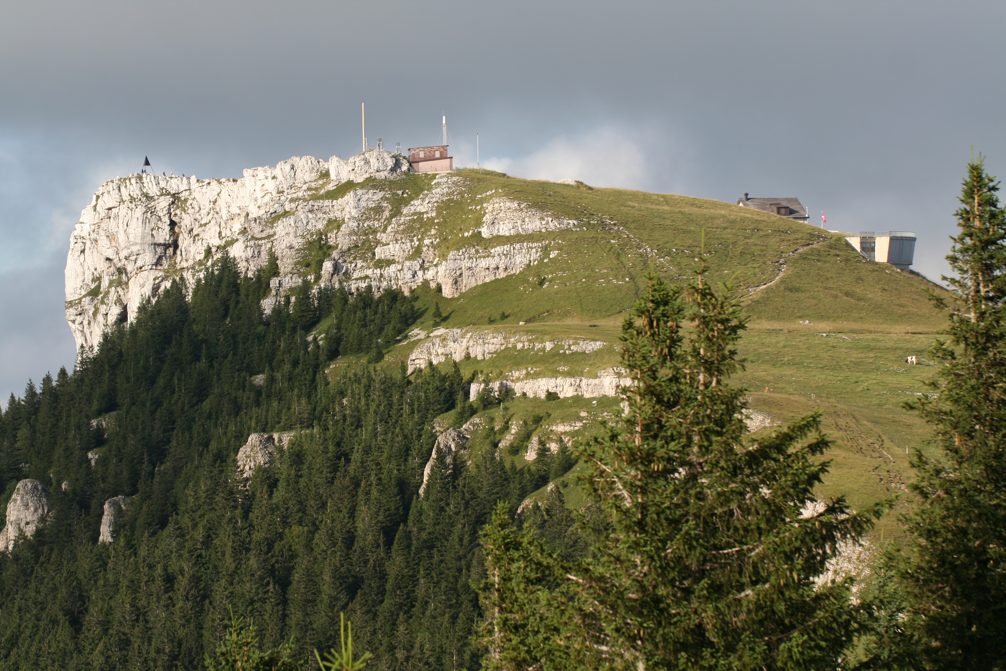 Le sommet du Chasseron avec le signal géodésique, l'observatoire météo, le toit de l'hôtel et le bunker de Telecom PTT.